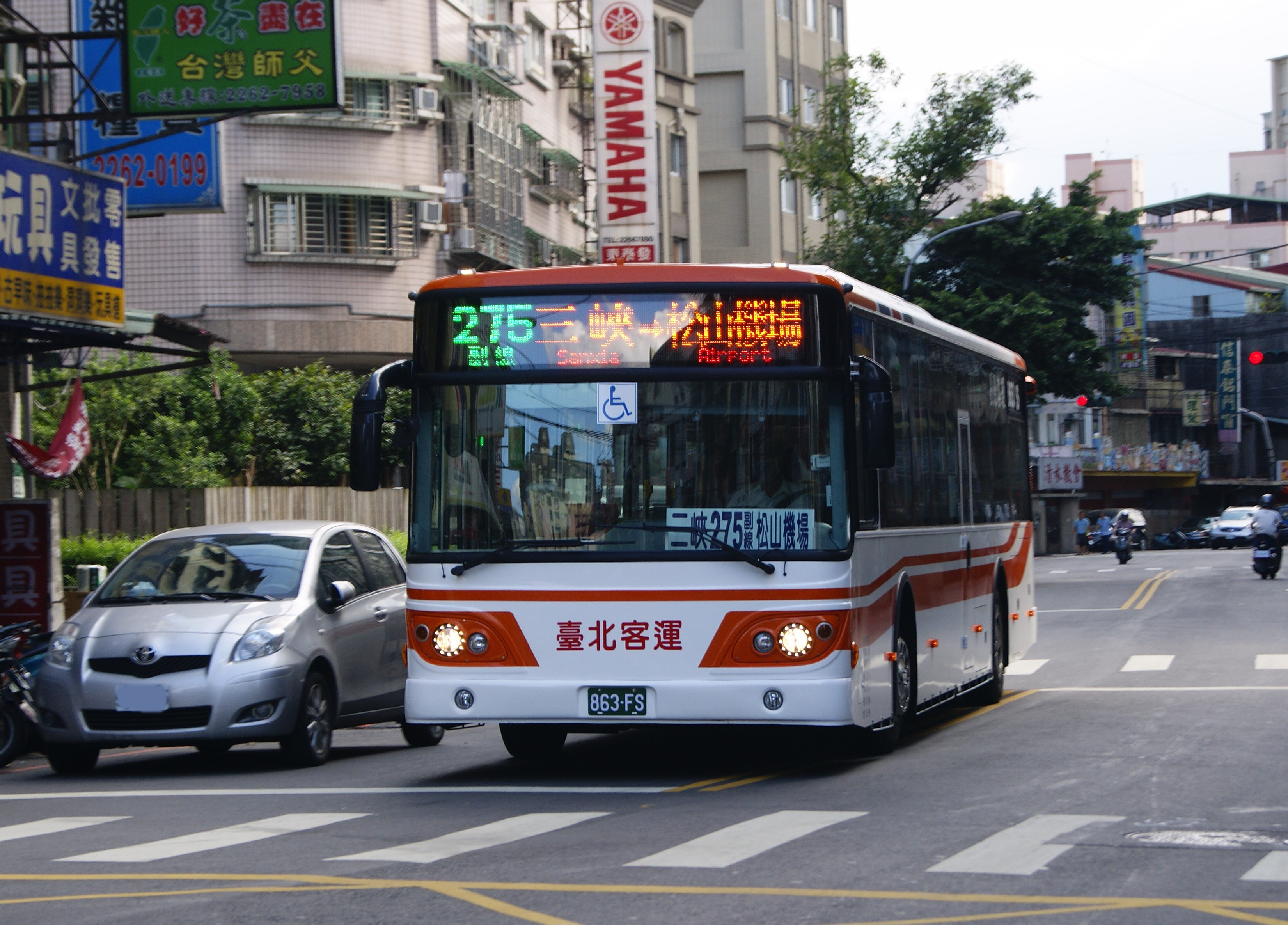 臺北客運275副線用車